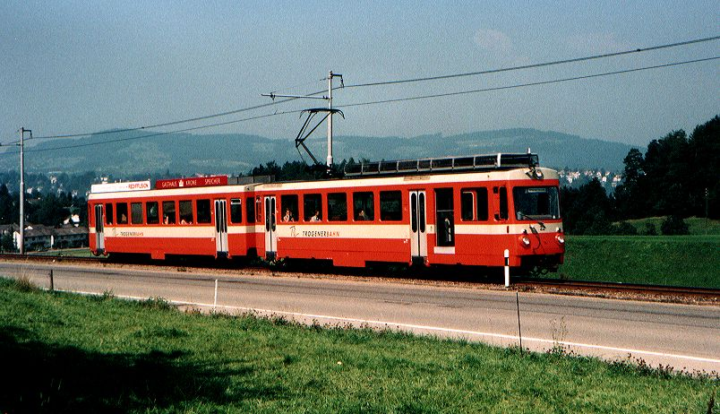 Description